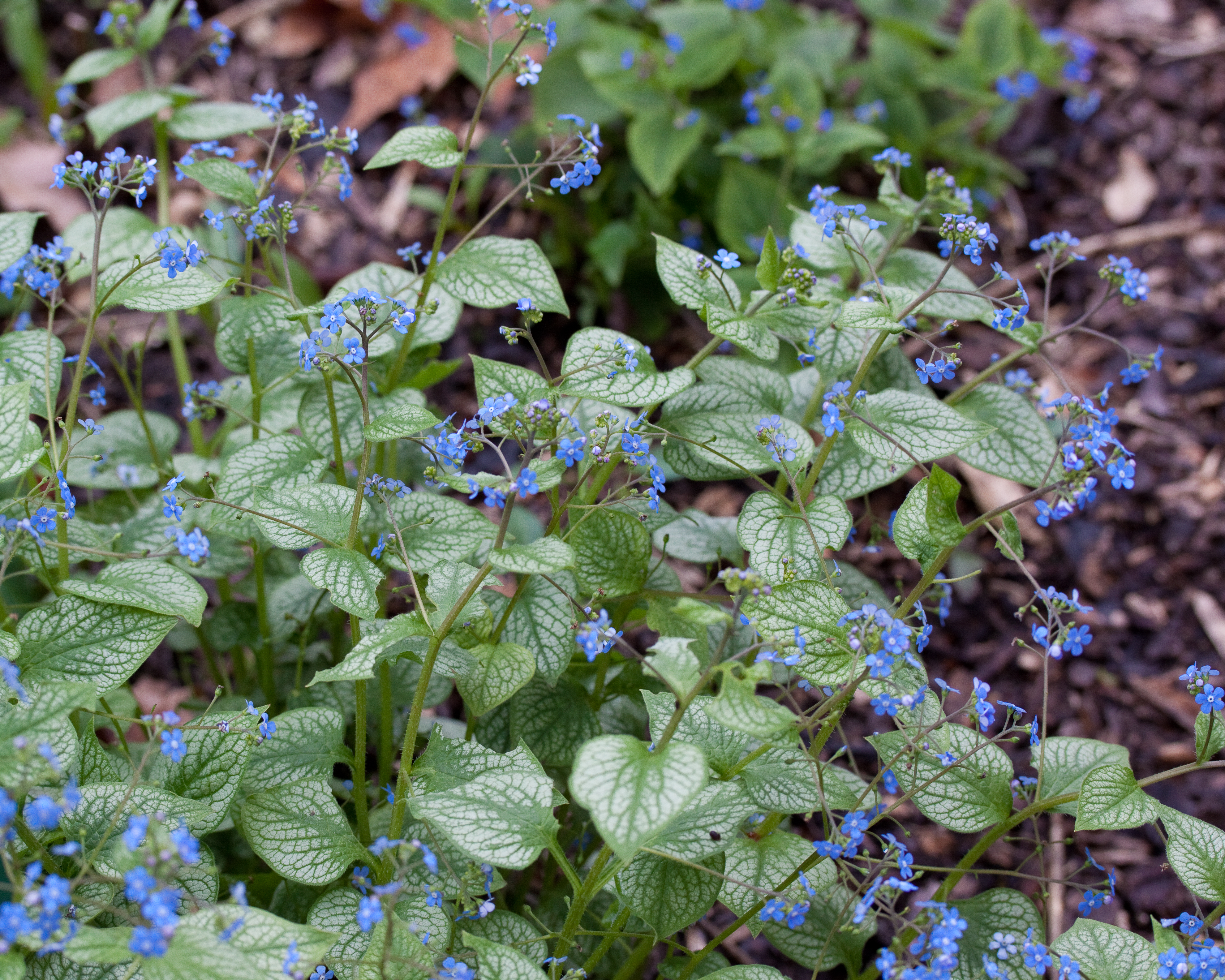 Floraison de Brunnera macrophylla - Jardin des Plantes - Paris - France